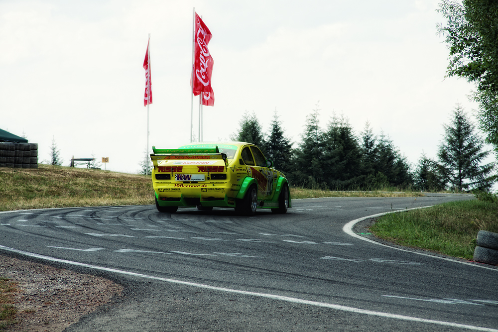 40. Trierer ADAC/RTT Bergrennen "Max Bronner Gedächtnis Bergpreis", 3. bis 5. Juni 2011 bei Thomm